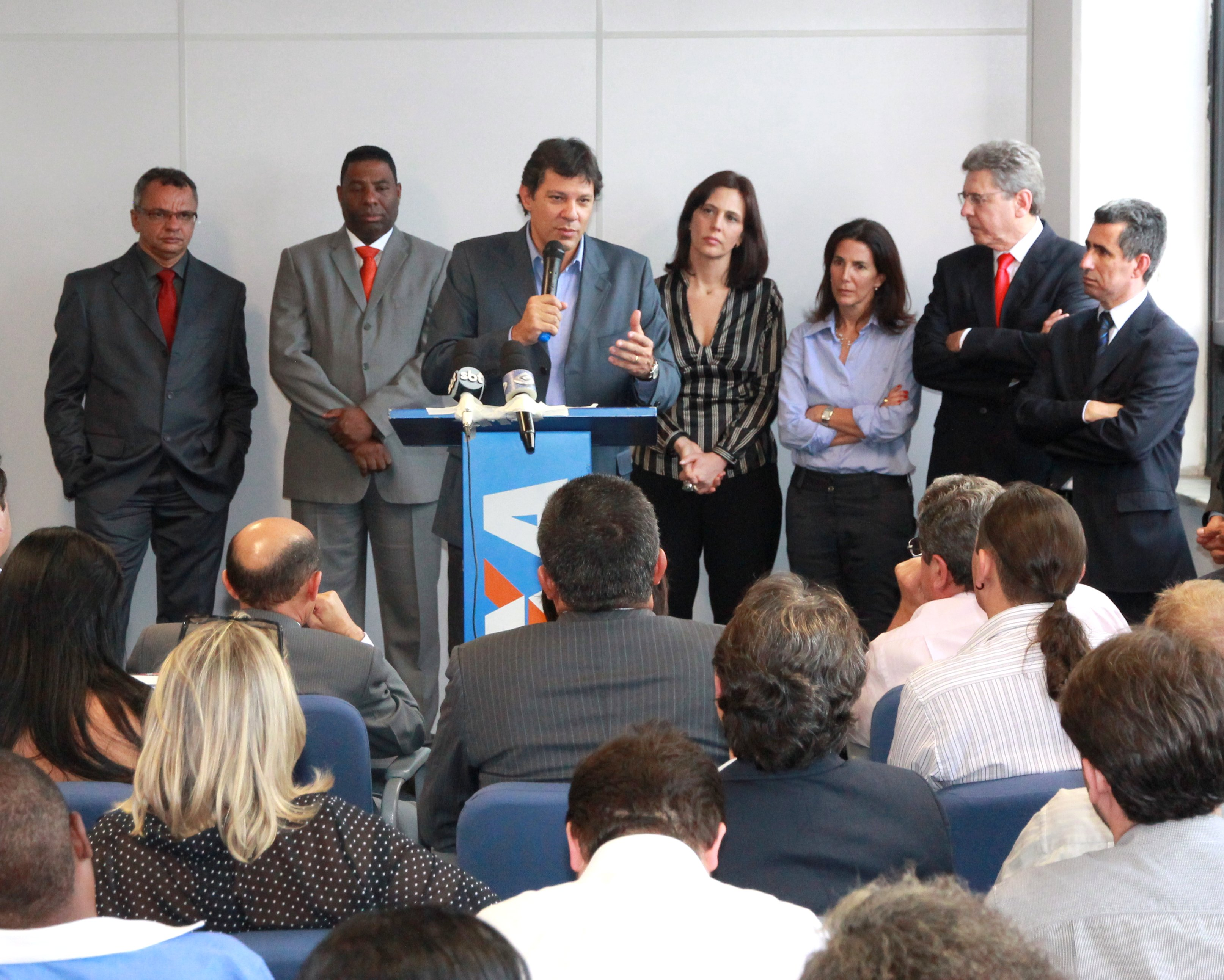 Fernando Haddad anunciando novos secretários na transição do novo governo, entre eles, Chico Macena, João Antonio,Eliseu Gabriel, Netinho, Marianne Pinotti e Luciana Temer.